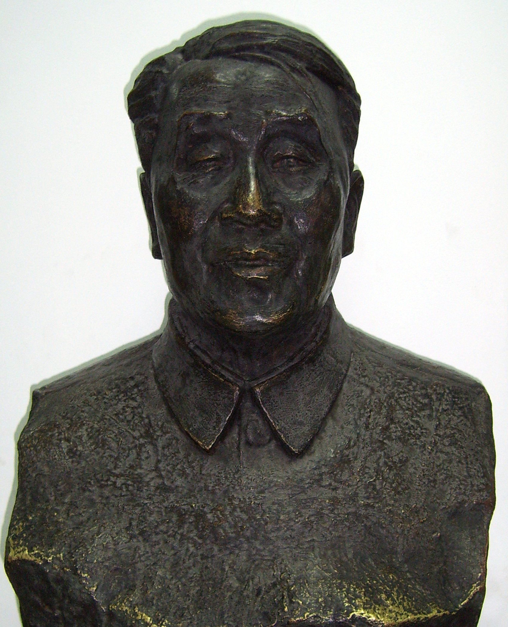 裴文中雕像，位于北京自然博物馆